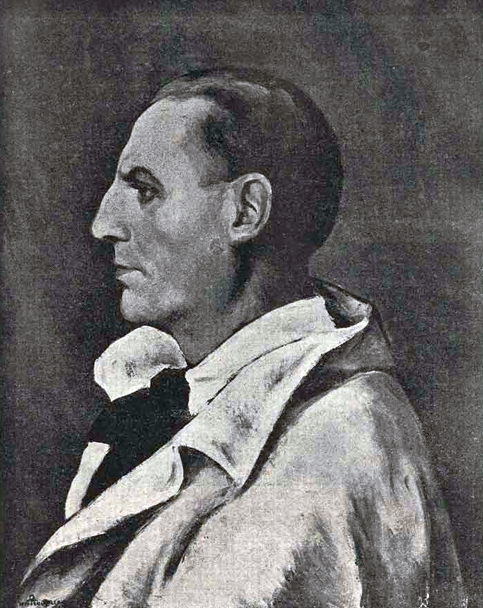 Autoportret